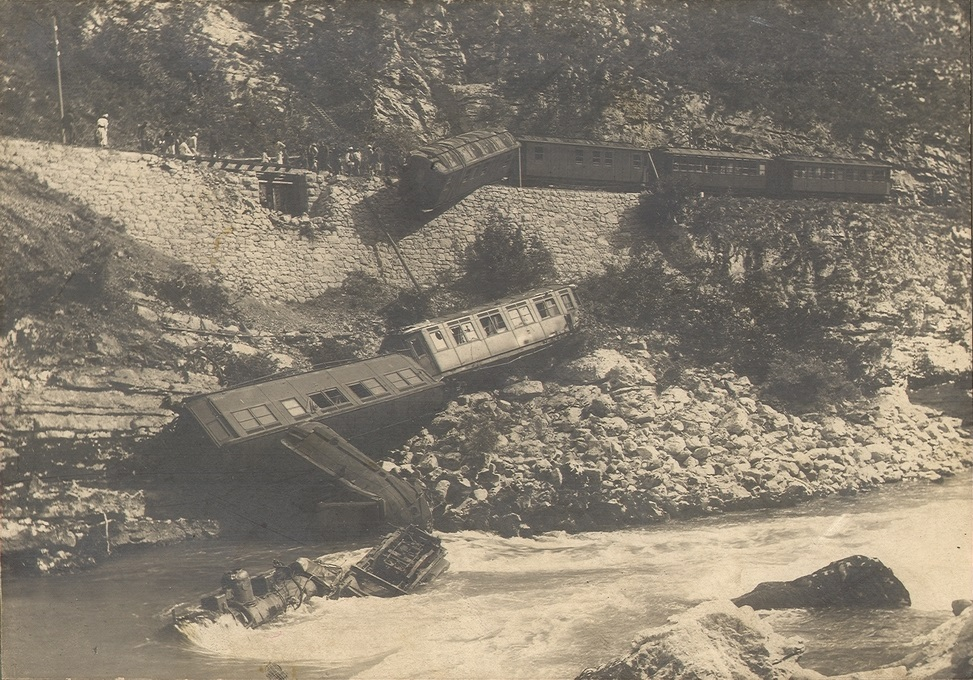 Le rapide de Mostar à Sarajevo dans la riviére de NarentaLa locomotive est dans le lit du fleuve, presque complètement submergée; elle a entraîné le wagon (brisé dans la chute) du personal de service et les deux premiers wagons de voyageurs arrêtées au bord du courant torrentueux, apès avoir plusiurs fois culbuté sur eux-mêmes.